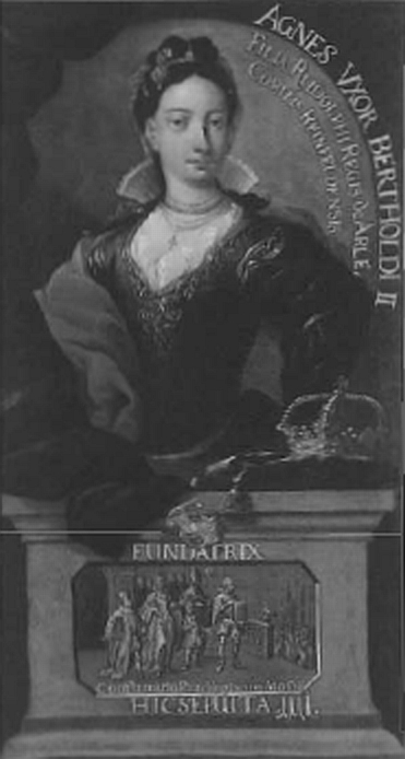 Agnes von Rheinfelden (* um 1065; † 19. Dezember 1111) als Gründerin (Fundatrix) des Klosters St. Peter auf dem Schwarzwald, Tafelbild in der Reihe der Klostergründer, 18. Jahrhundert. Foto: Bild- und Filmstelle der Erzdiözese Freiburg (Christoph Hoppe).